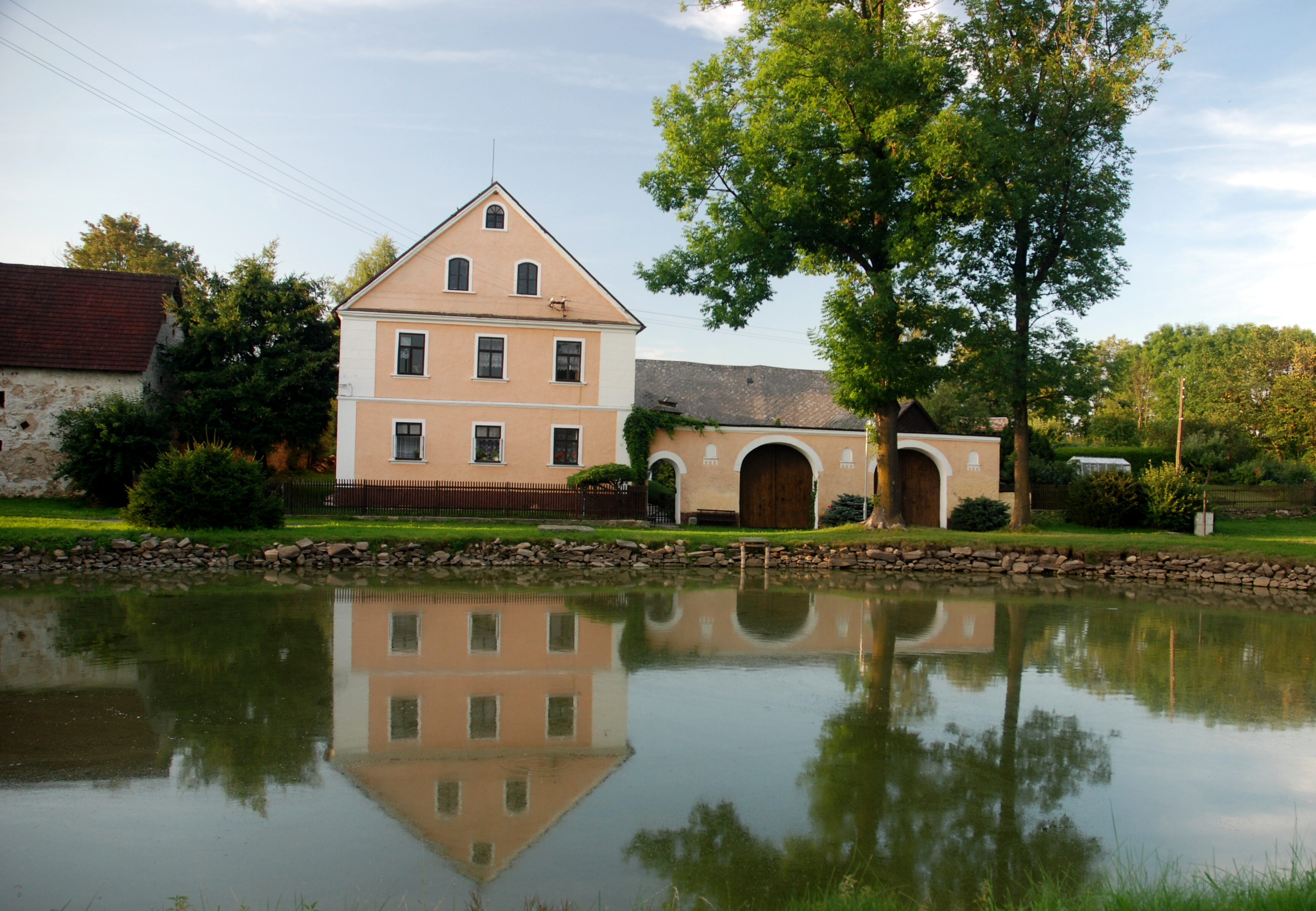 Horní Jadruž